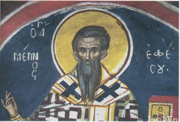 Мемнон , архиепископ Ефесский. Греция. Афон, монастырь Дионисиат, фреска XVI век